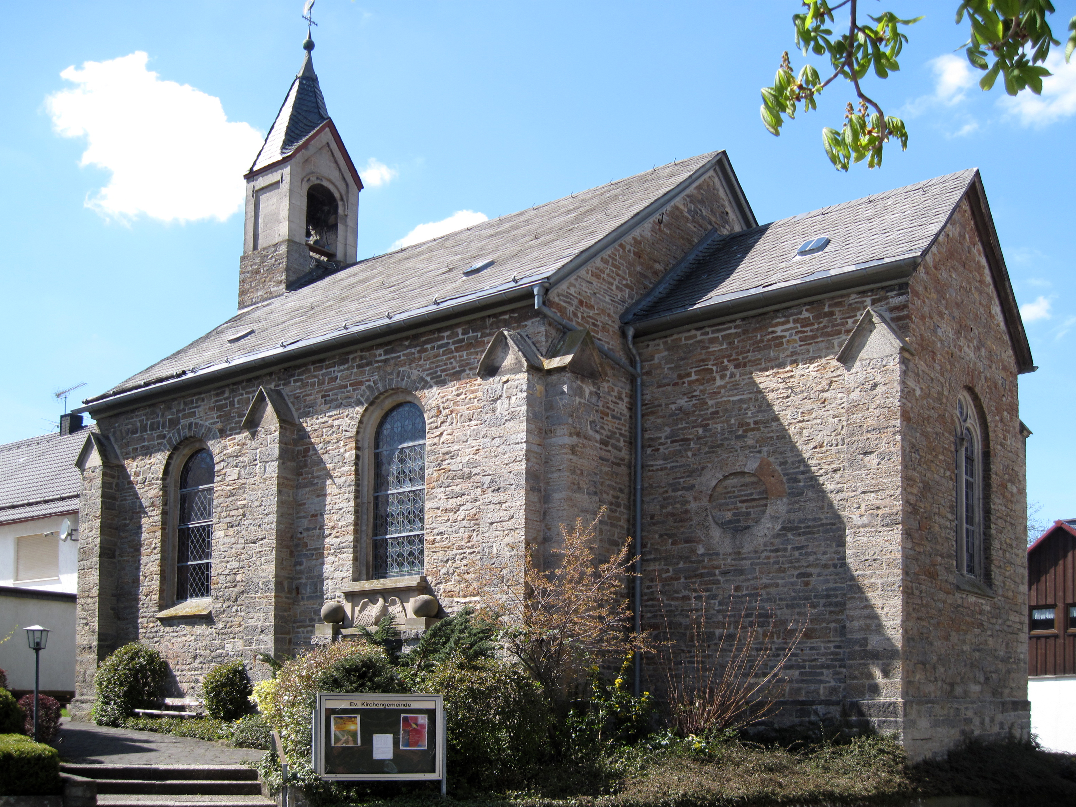 St. Margarethenkirche, Ottlar, Gemeinde Diemelsee, Hessen, Deutschland